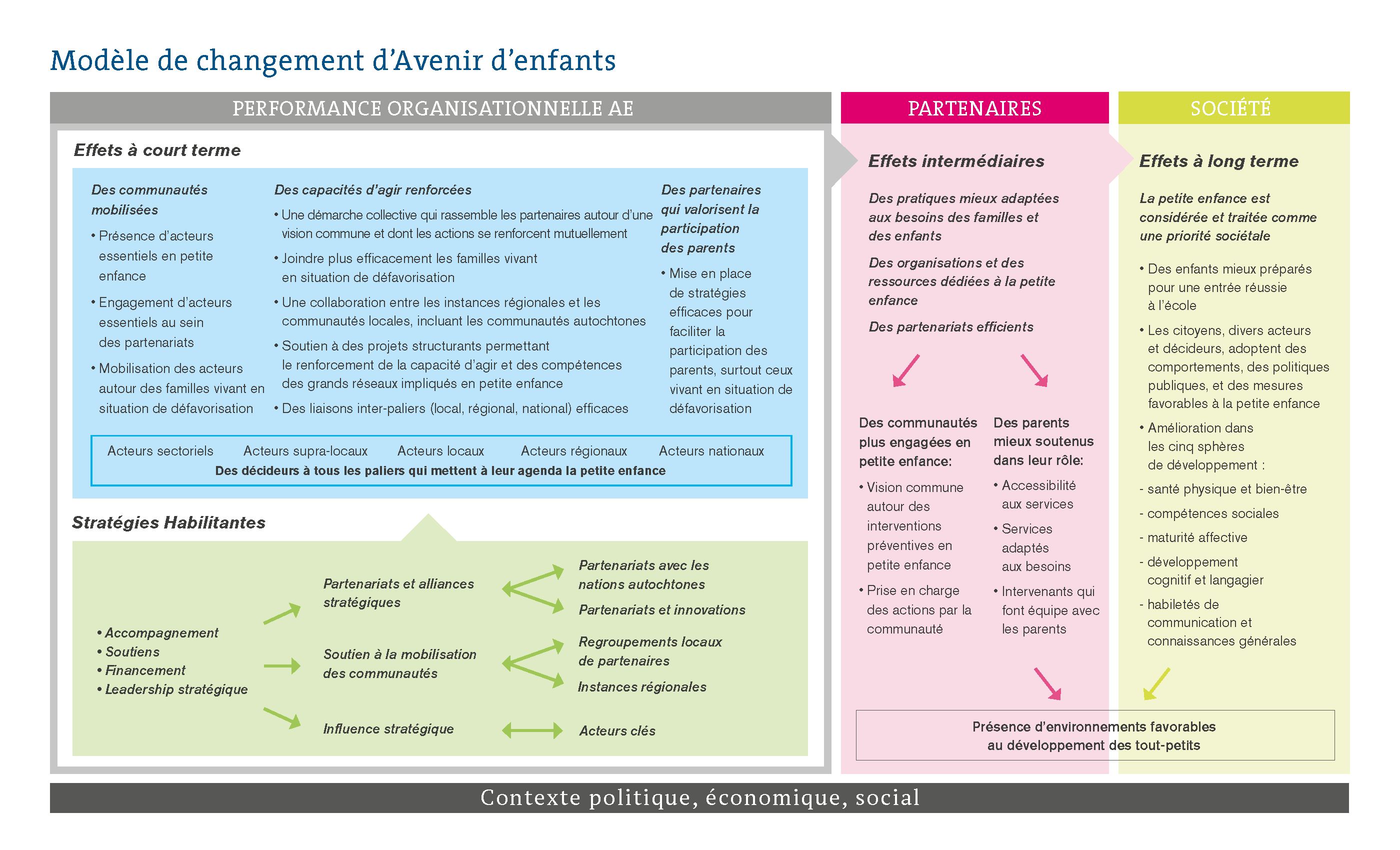 Modèle de changement d'Avenir d'enfants, décrivant les effets à court terme, intermédiaires et à long terme de même que les stratégies habilitante pour parvenir à leur réalisation.